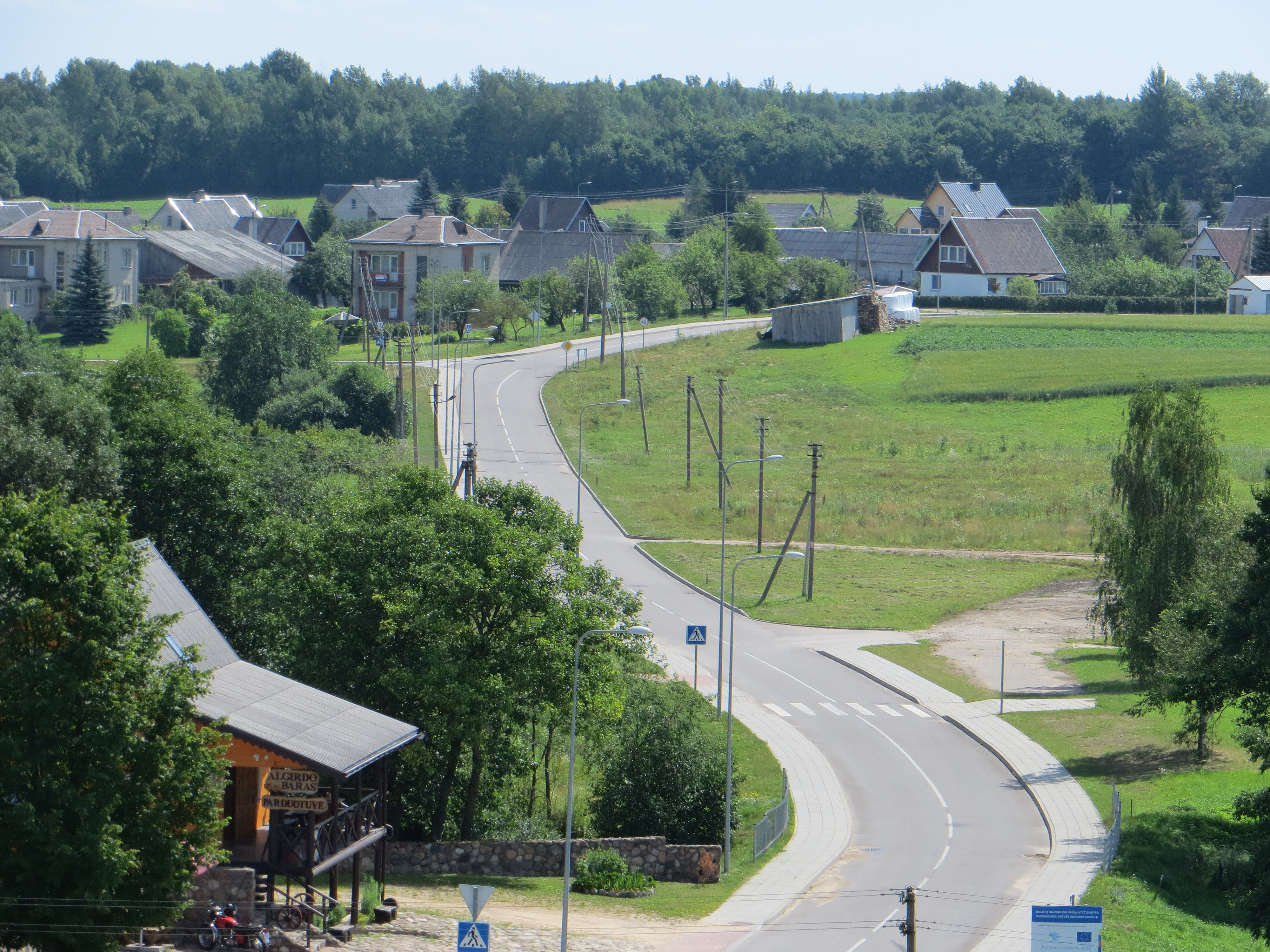 Žalvariai, Lithuania